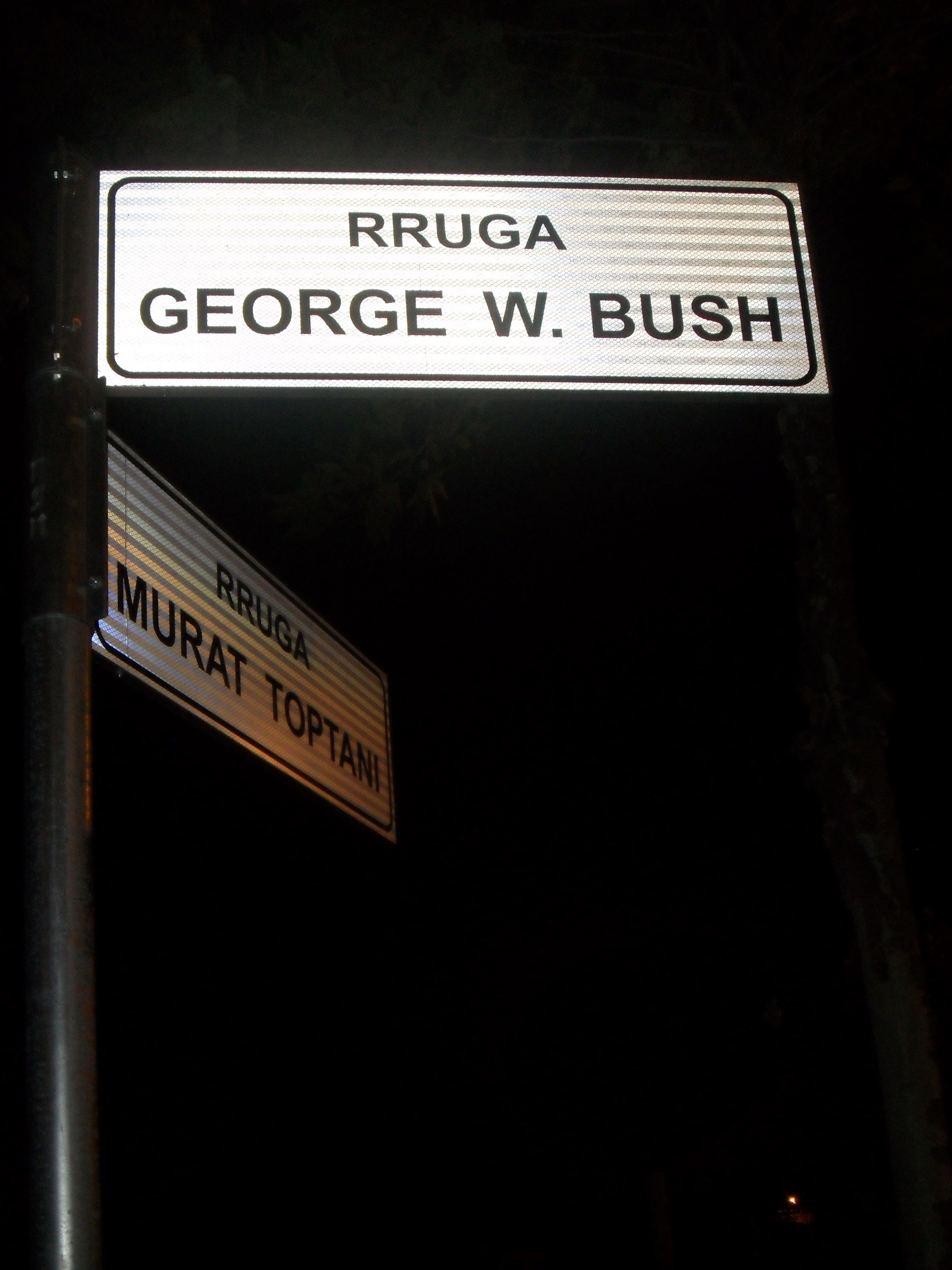 Ulica George'a W. Busha w Tiranie